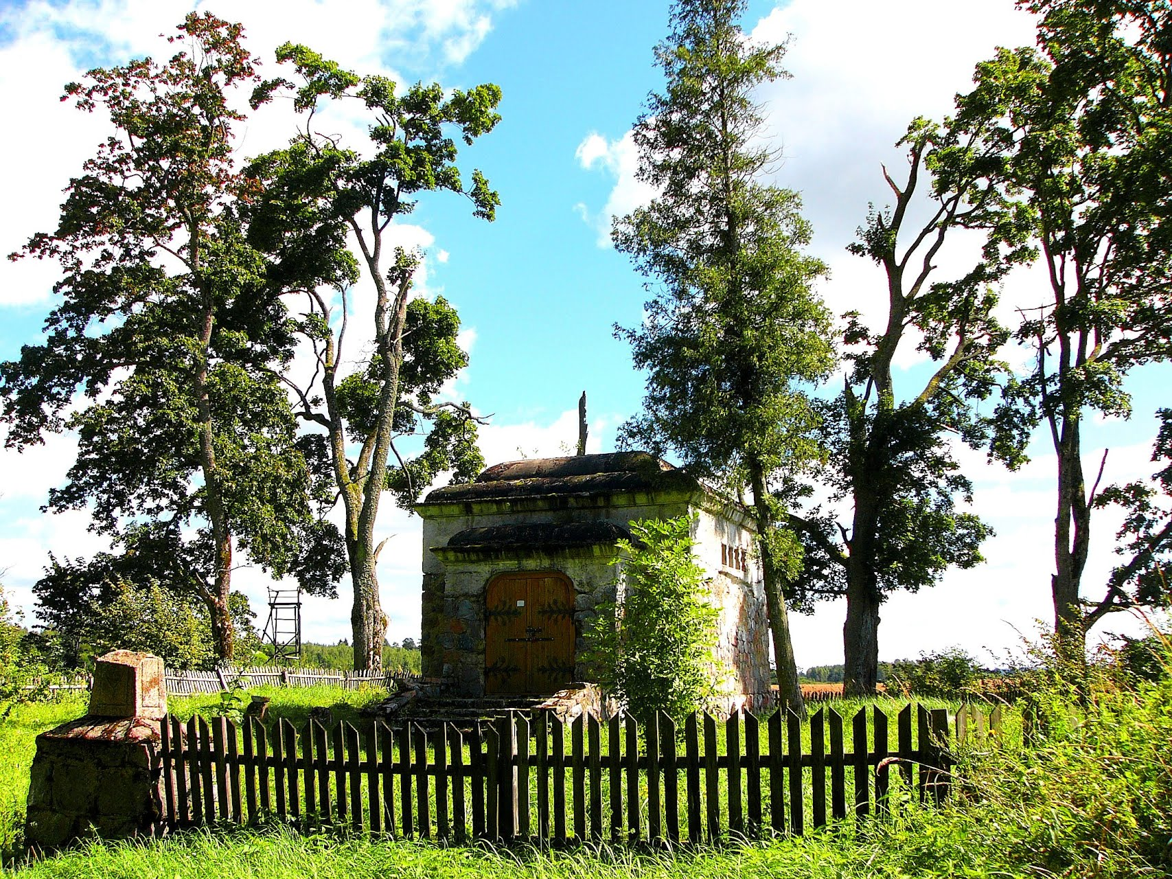 Niedaleko Zakałcza Wielkiego. Cmentarz rodziny Steinert.